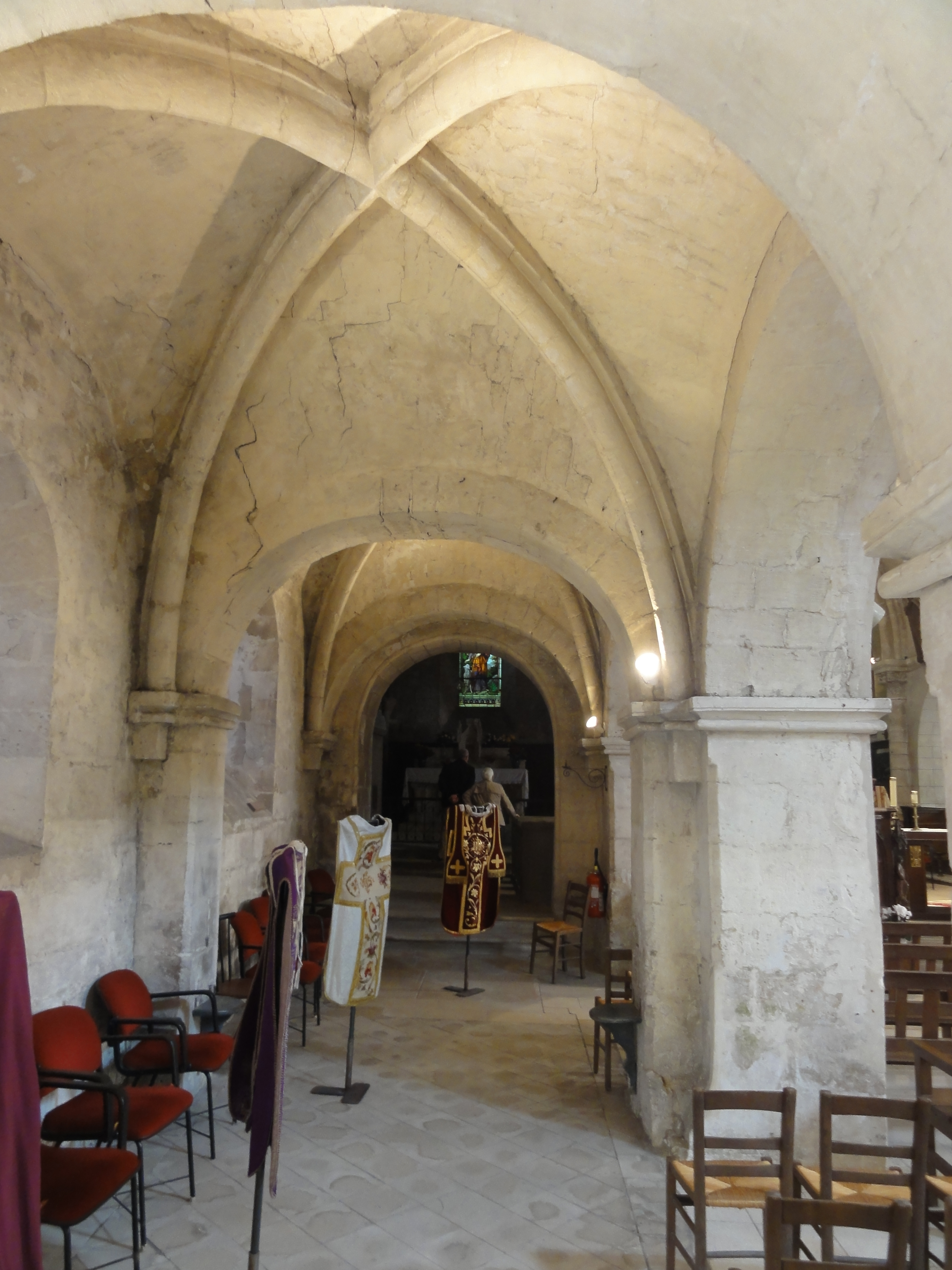 Bas-côté nord, 5e travée, vue vers l'est.